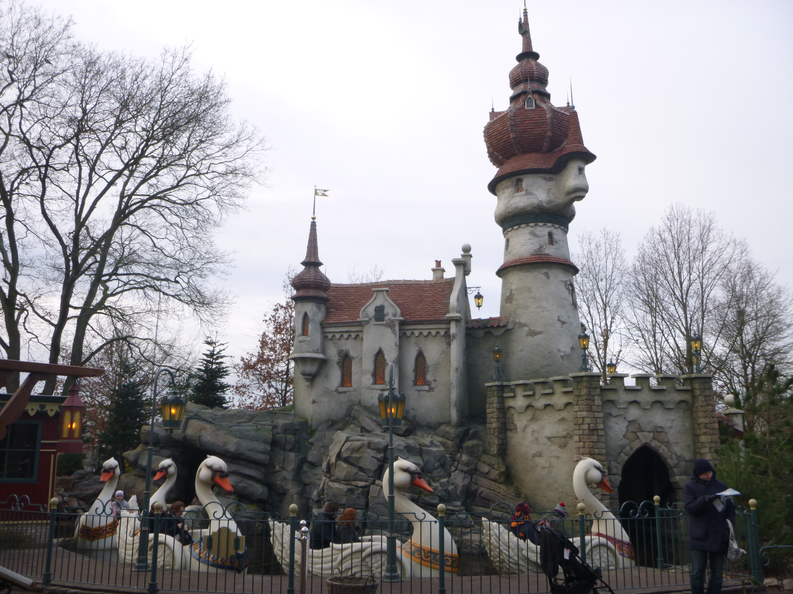 Le conte les Six Cygnes à Efteling